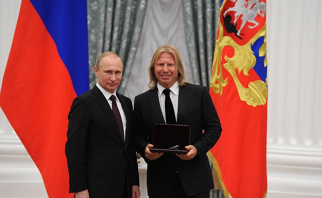 Почётное звание «Заслуженный артист Российской Федерации» присвоено Виктору Дробышу